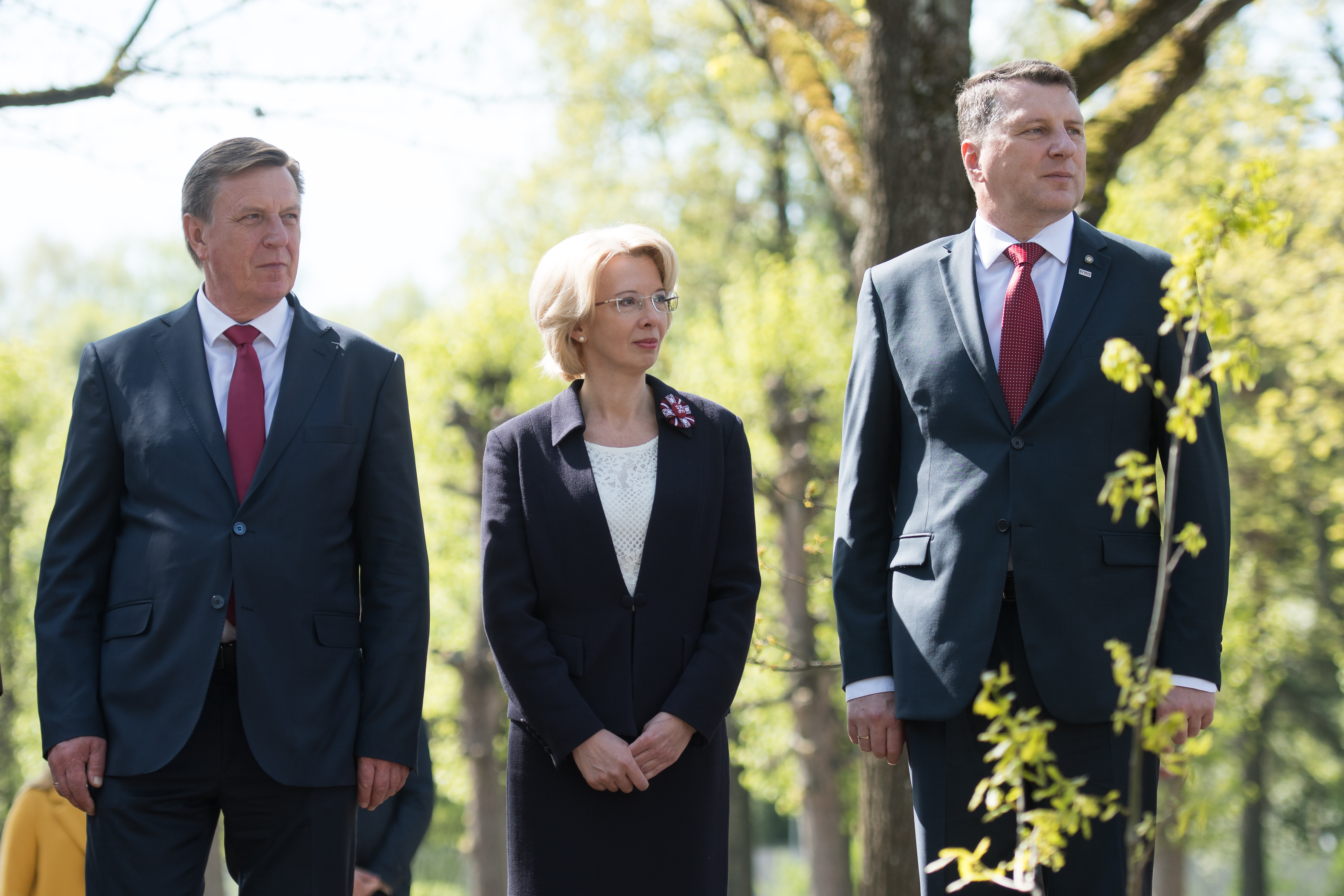 2018.gada 8.maijs. Svinīga vainagu nolikšanas ceremonija Rīgas Brāļu kapos. Foto: Ieva Ābele, Saeima Izmantošanas noteikumi: saeima.lv/lv/autortiesibas